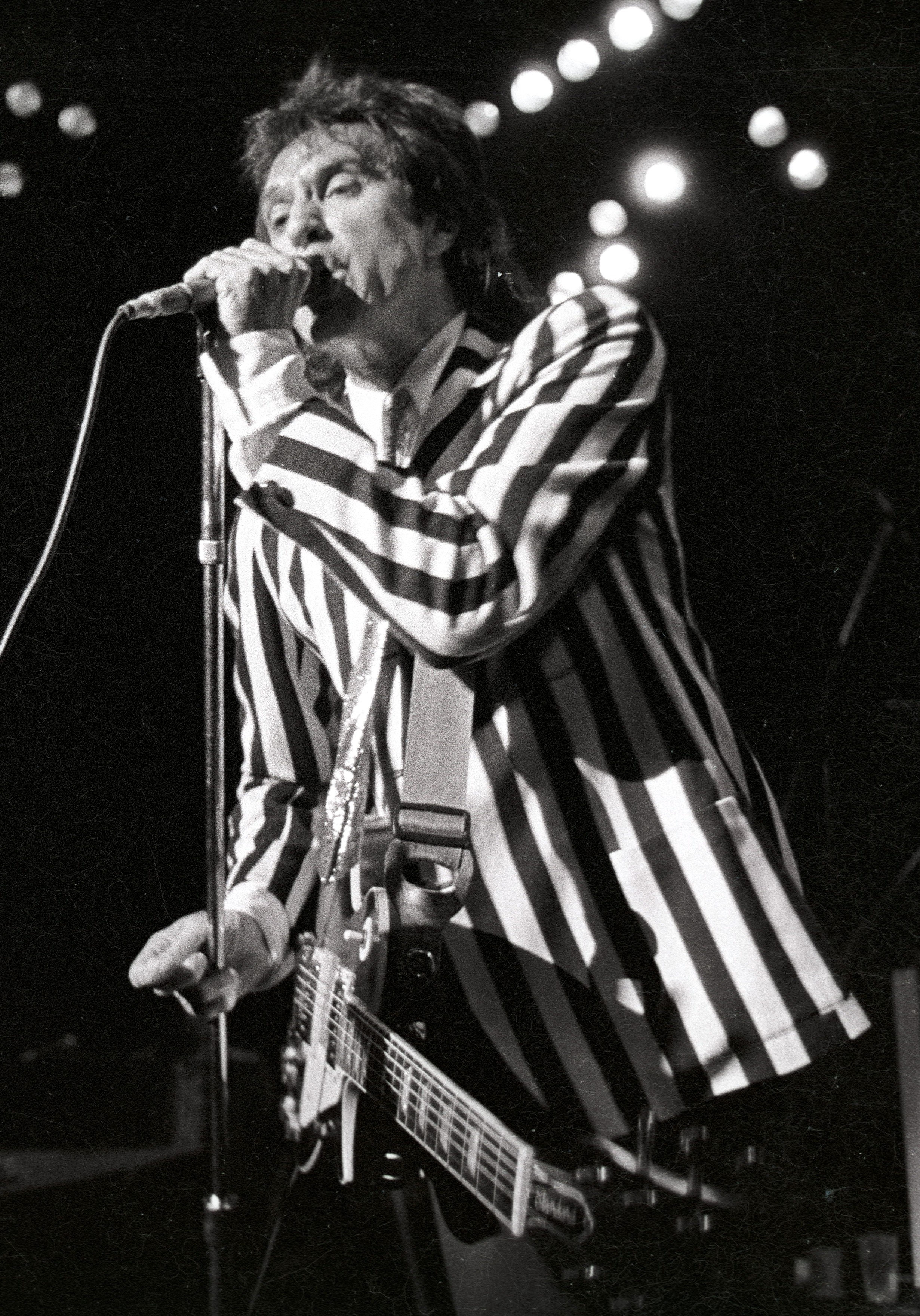 Koninklijk Circus - Brussels - 1985